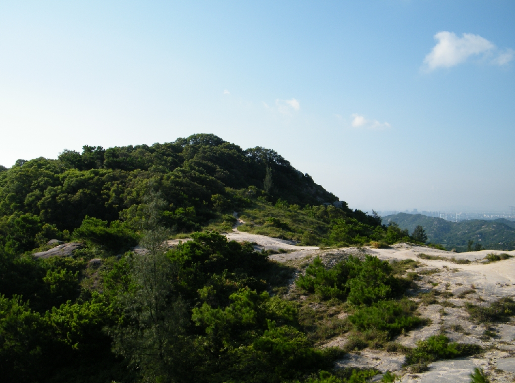 達濠小望山，有如棉城之東山。